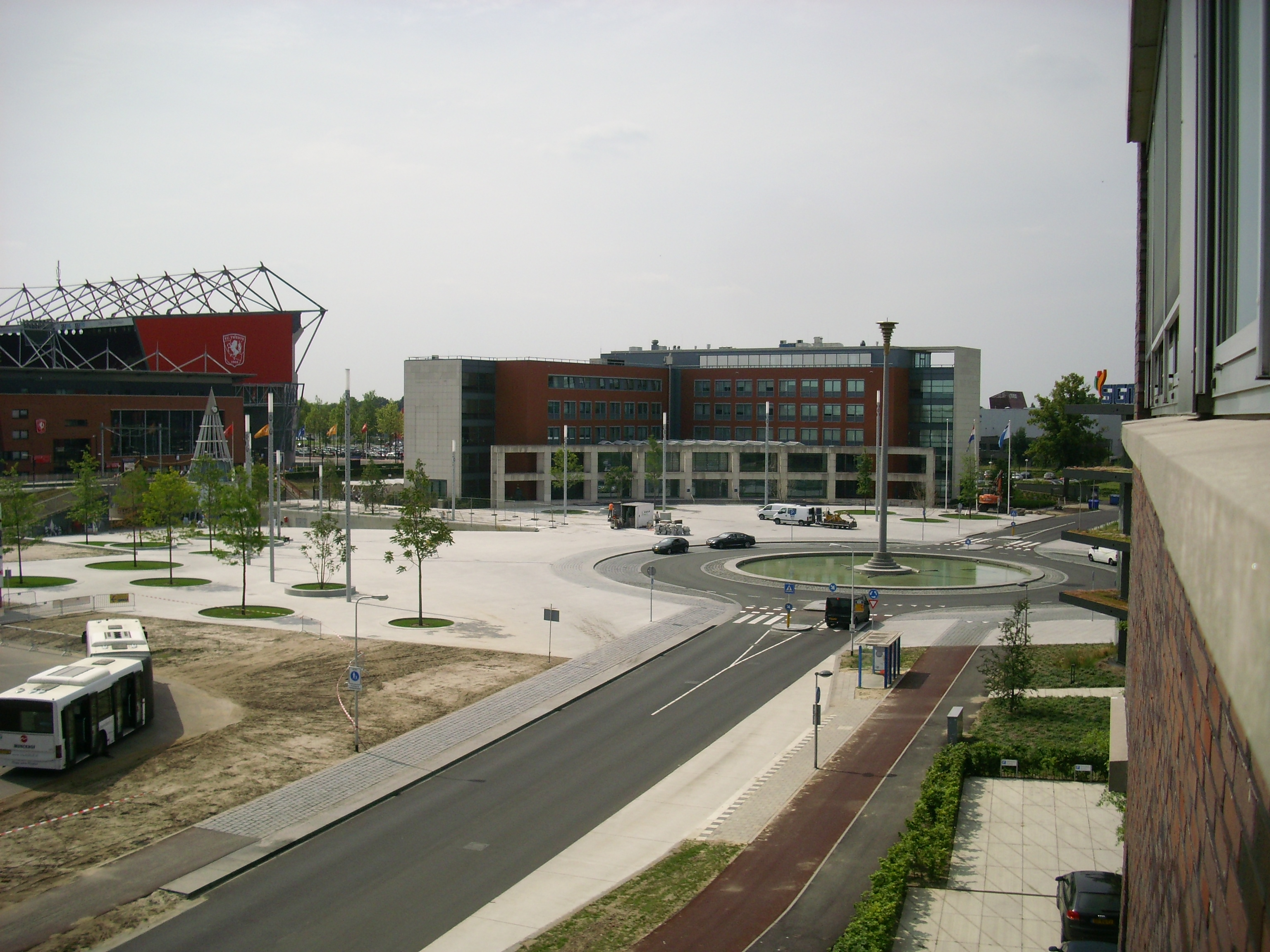 2013 Stationsplein Enschede Kennispark (Drienerlo)